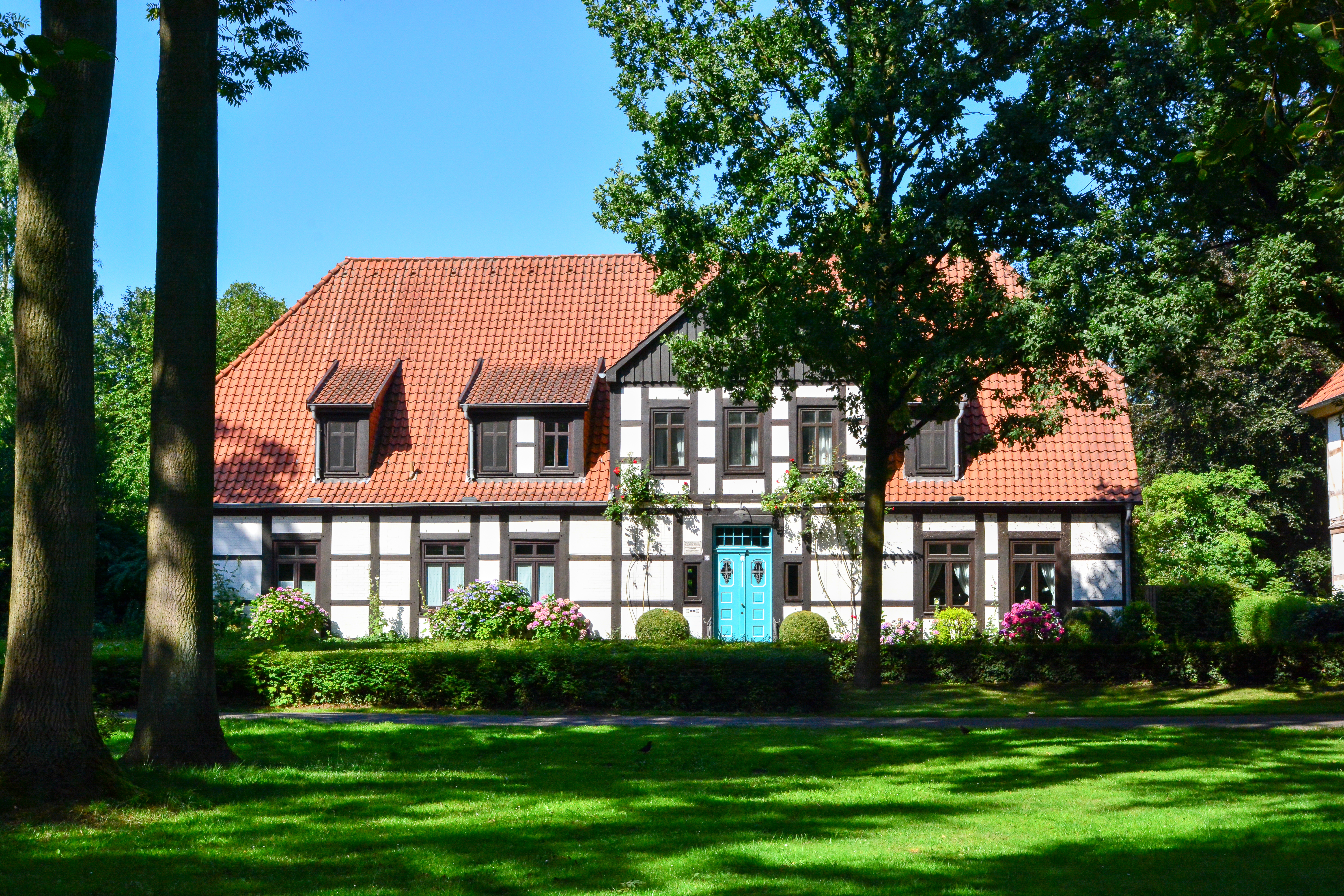 Diepholz, Geburtshaus von Frieda Duensing (1864-1921) (vermutlich ein Baudenkmal, aber keine Denkmalliste von Diepholz im Internet auffindbar